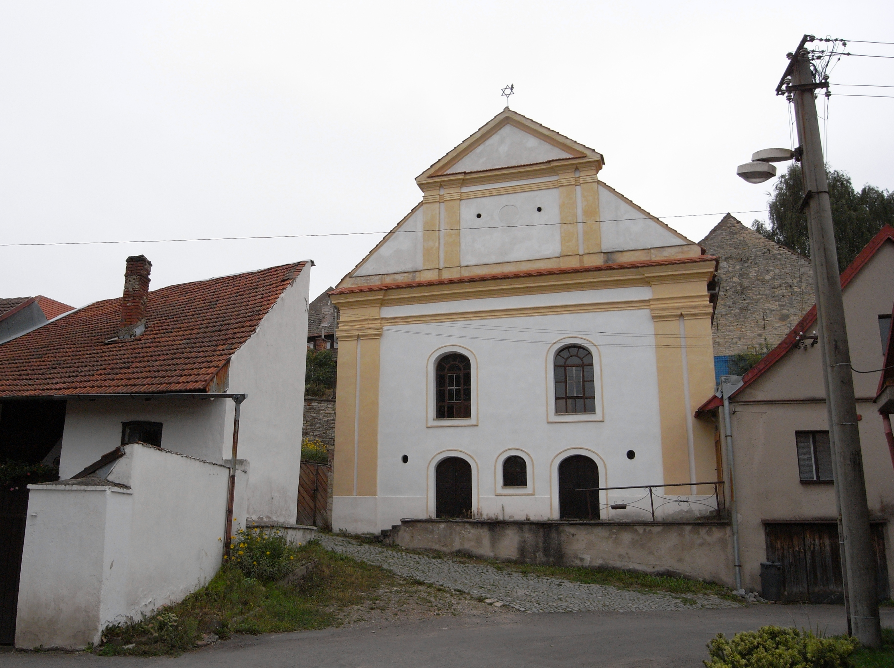 Synagoga (Luže), Jeronýmova, Luže